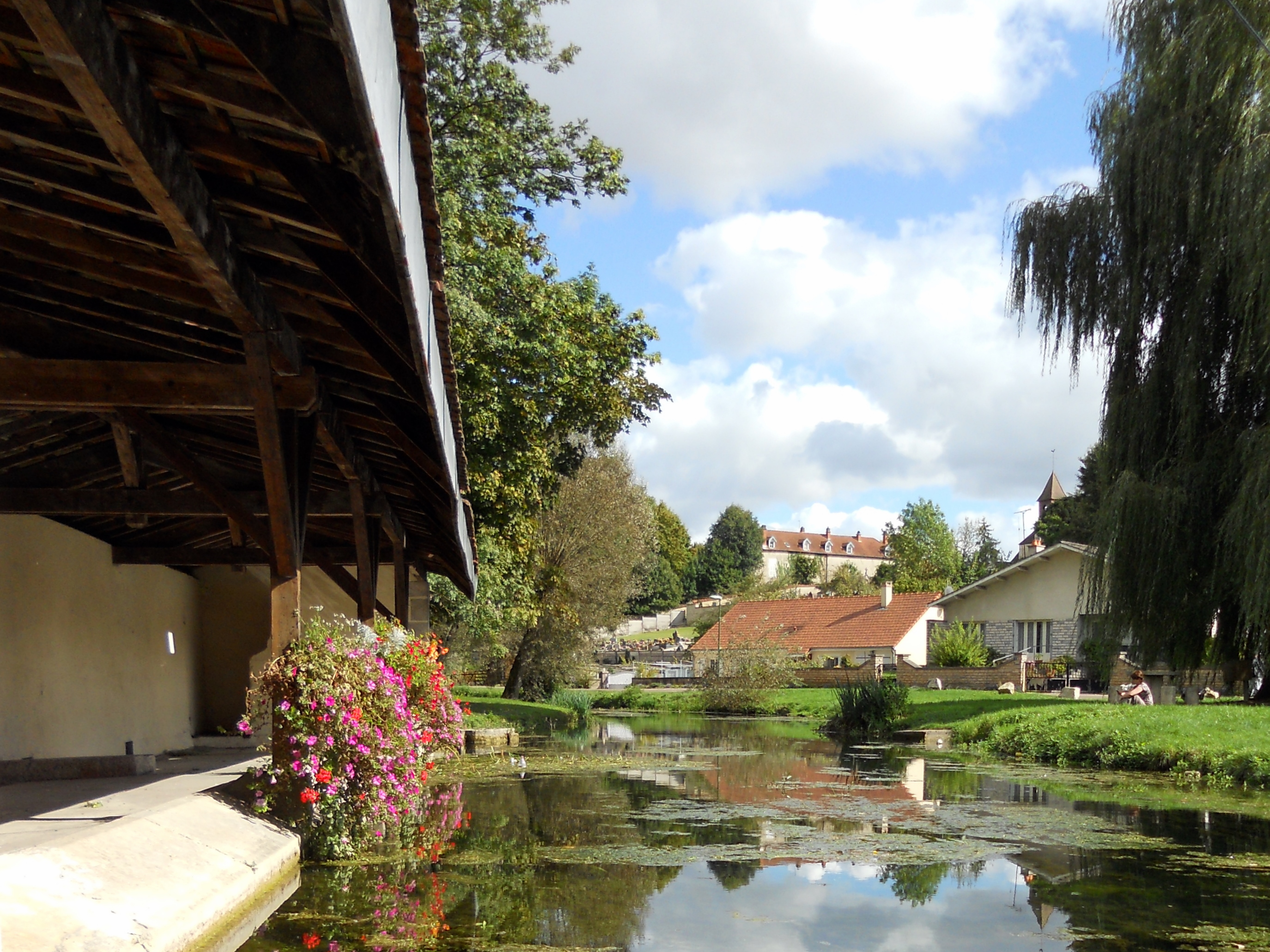 Photographie de l'Ignon : à gauche se situe le lavoir de Marcilly-sur-Tille, au fond au centre se situe le cimetière, et au fond à droite on peut apercevoir le clocher de l'église.